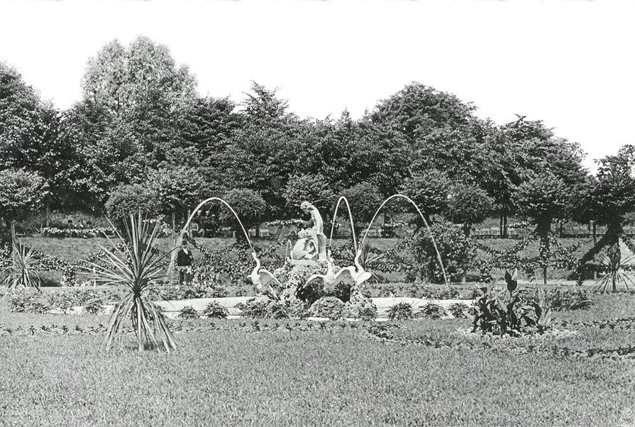 Park Helenów w Łodzi – mała fontanna